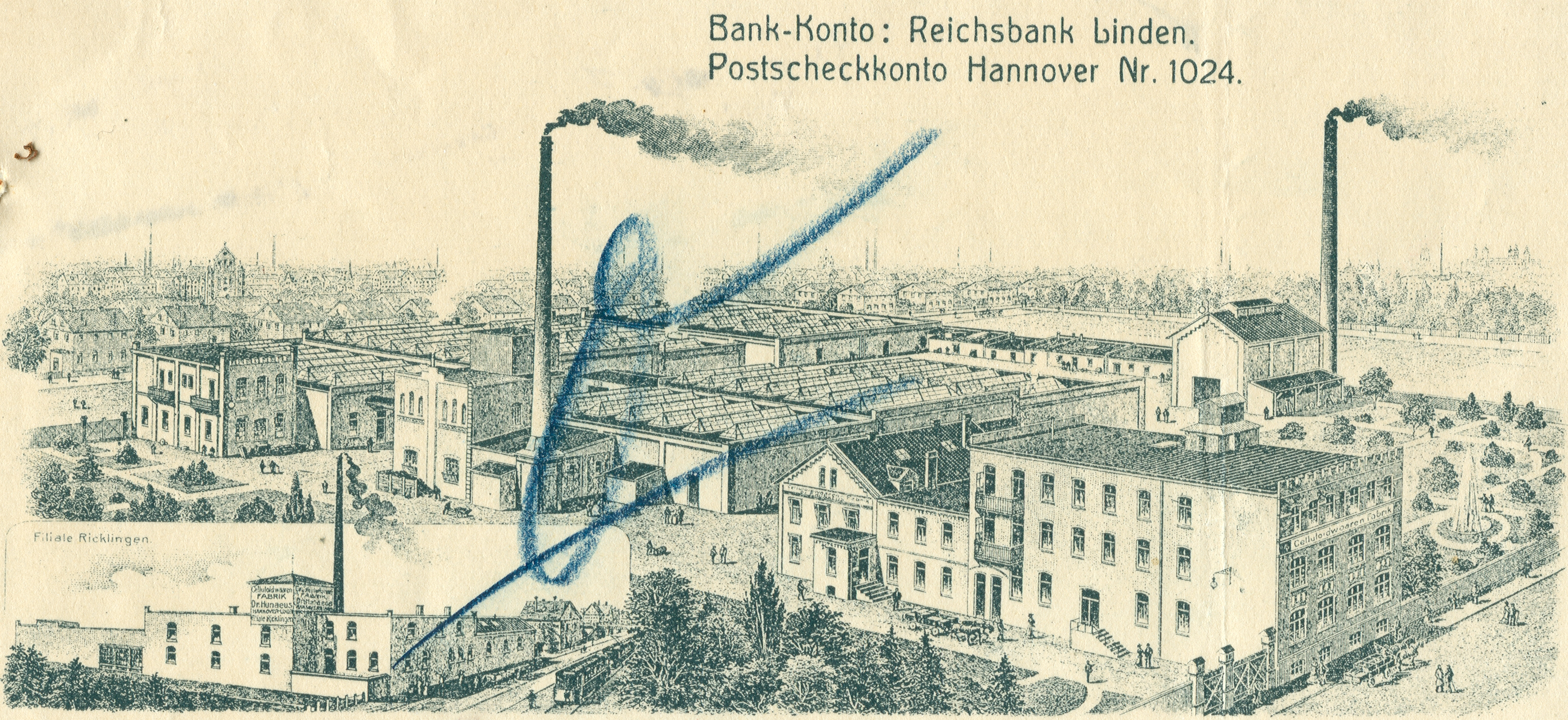 Ausschnitt aus einem von verschiedenen Personen beschrifteteten Rechnungsvordruck der im 19. Jahrhundert von Paul Hunaeus gegründeten Celluloidwaren-Fabrik Dr. P. Hunaeus, hier vermutlich mit einem Kupferstich oder Holzstich, der die beiden Fabriken in Hannover-Linden sowie Hannover-Ricklingen zeigt.